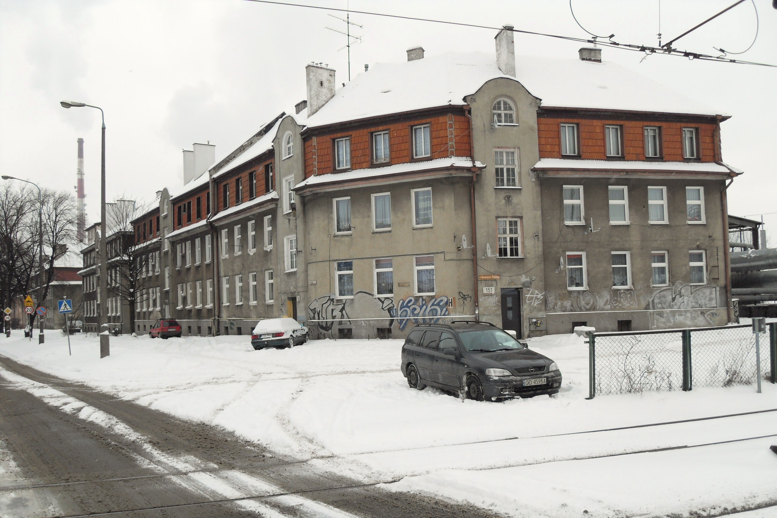 Dawne budynki mieszkalne pracowników Stoczni Schichaua (Schichau-Kolonie) w Gdańsku Młyniskach, przy skrzyżowaniu ul. Twardej i ul. Marynarki Polskiej.